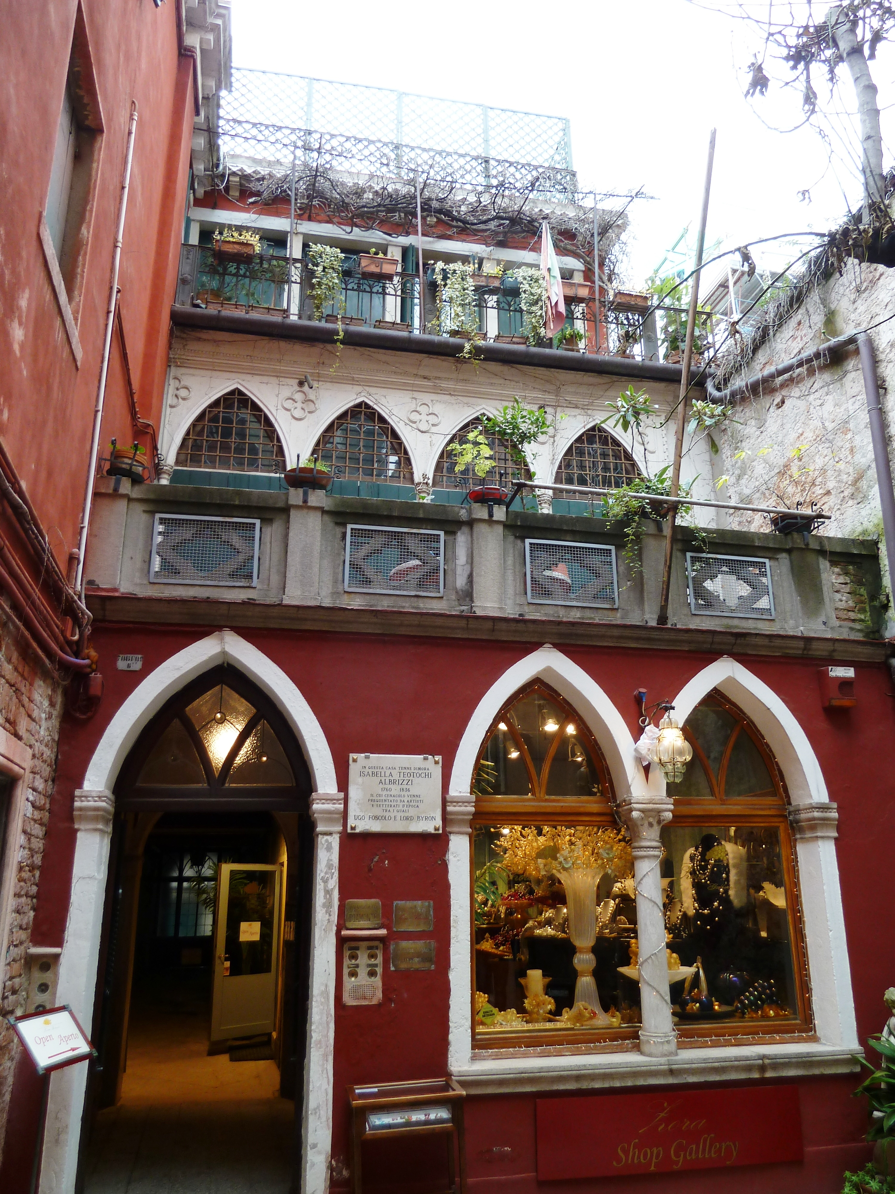 Casa isabella albrizzi san marco